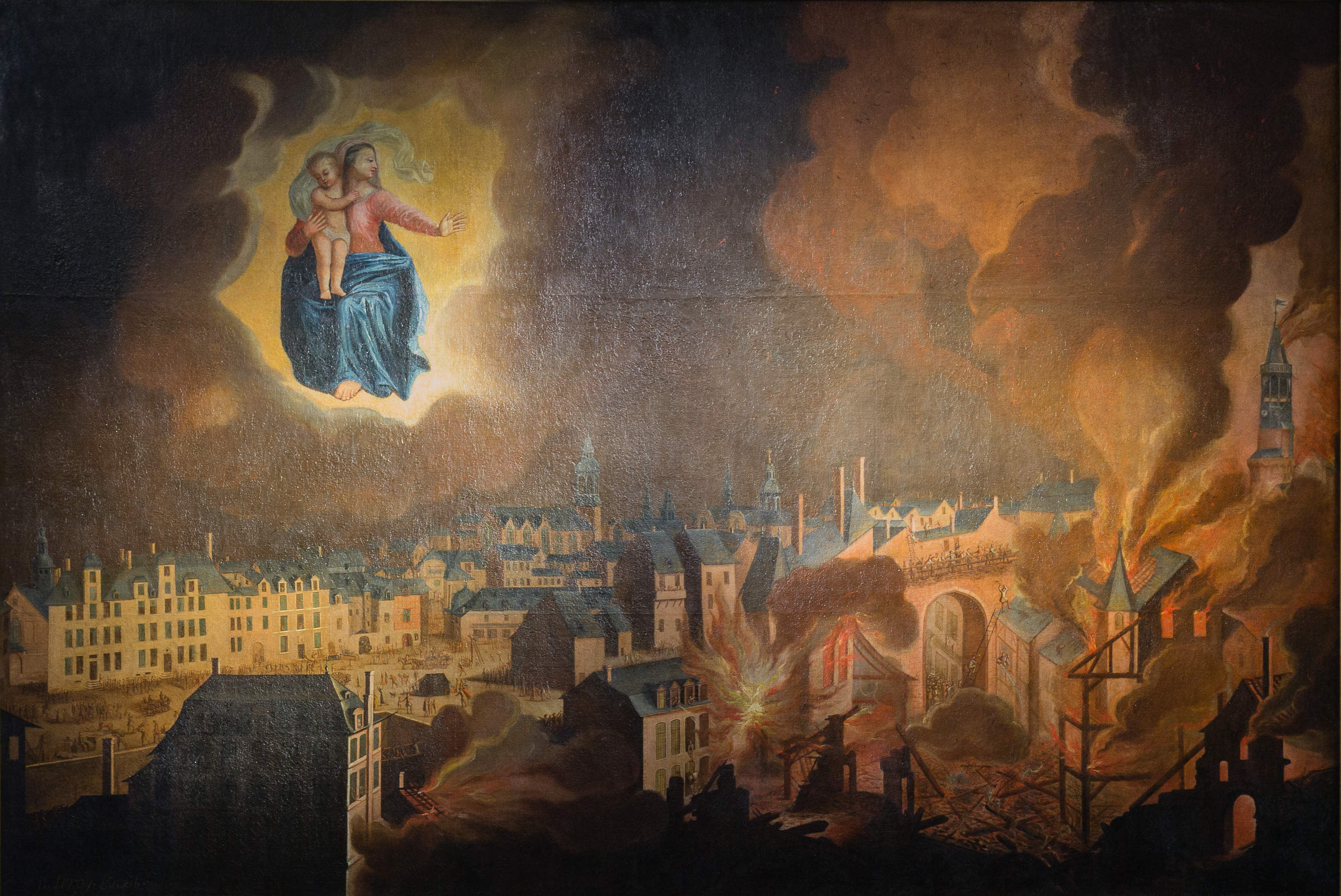 Copie d'un ex-voto offert par les habitants de Rennes après l'incendie de la ville en 1720.